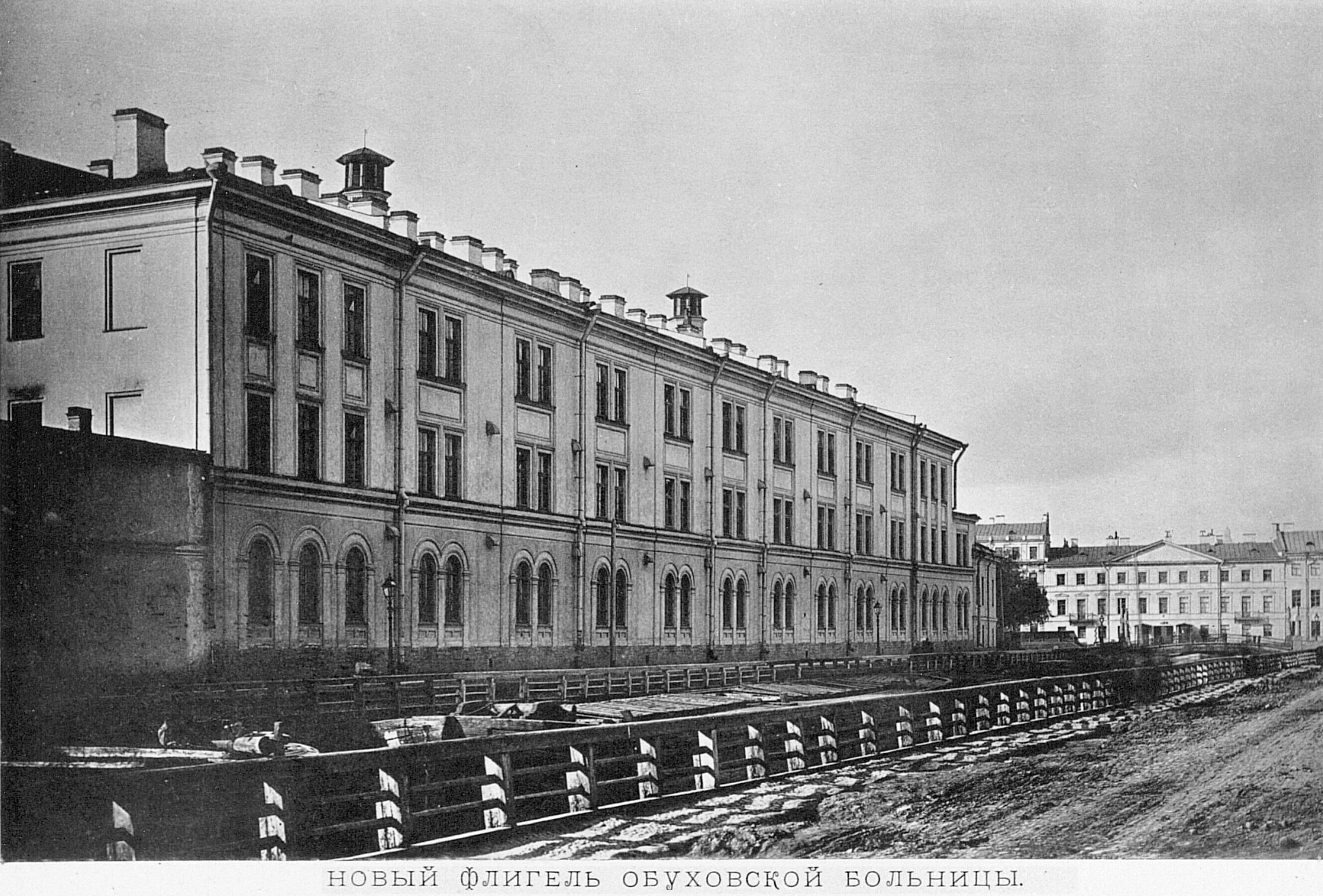 Обуховская больница, флигель, 1870-е годы